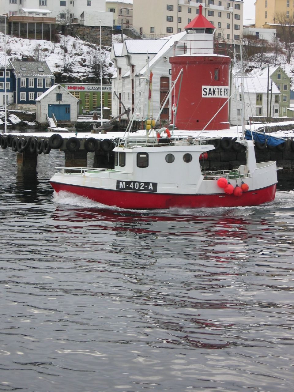 Home